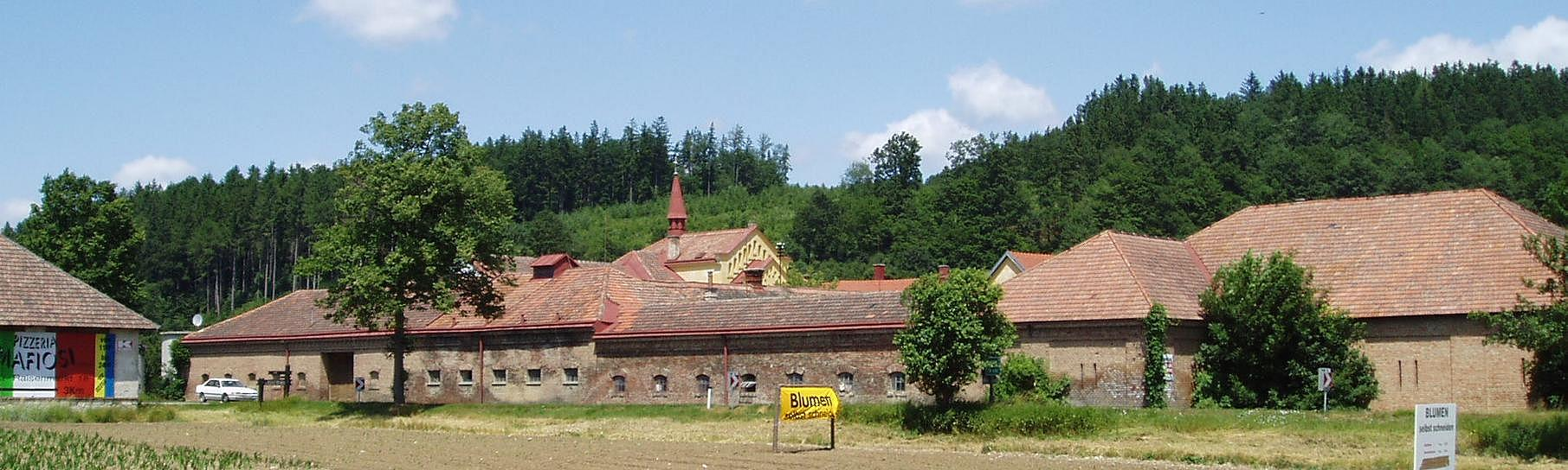 Mayerling- Panorama der Stallungen und Franziskanerinnenkirche.